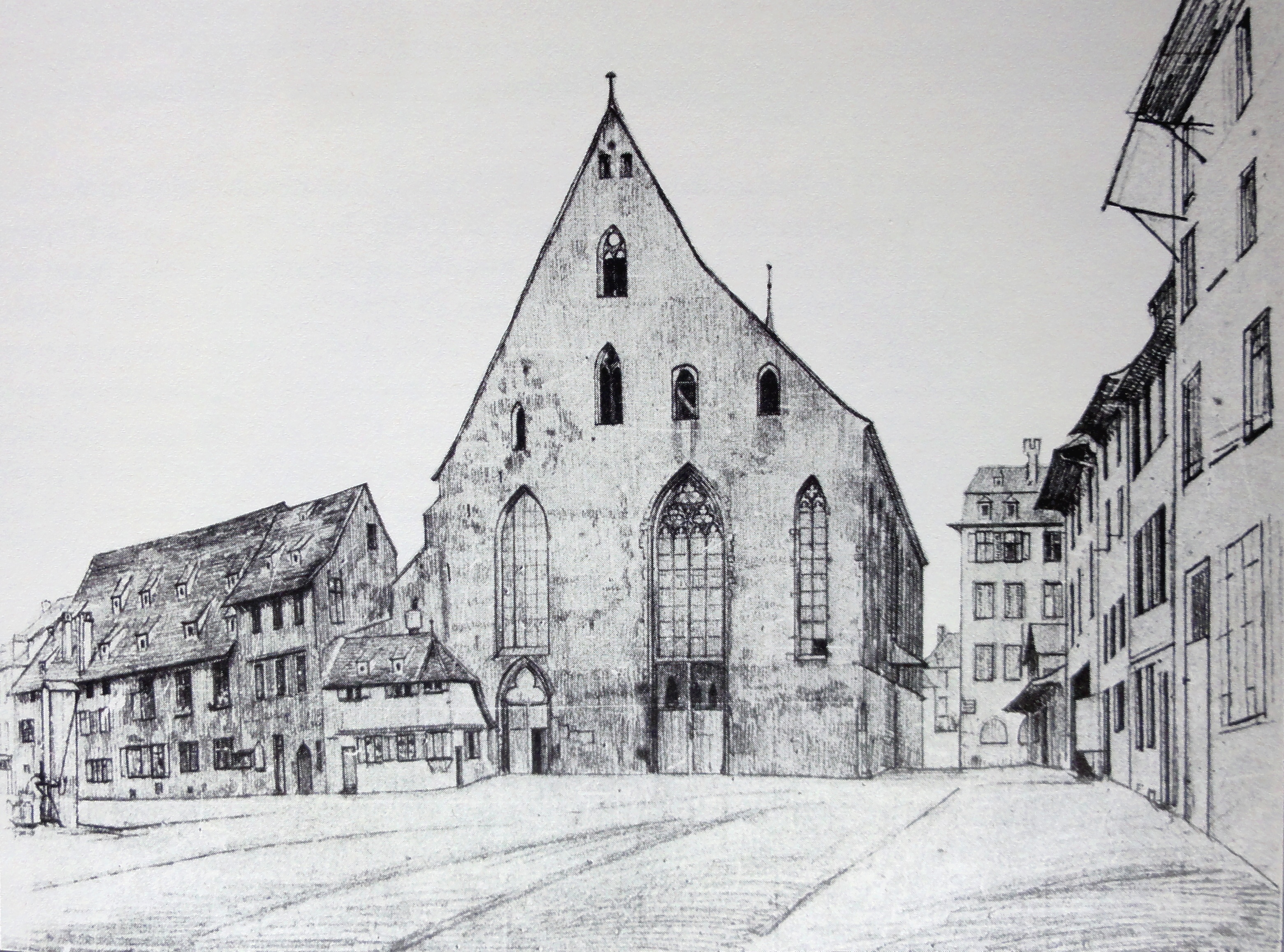 Alsace, Bas-Rhin, Vues historiques de Strasbourg, Façade de l'Eglise des Dominicains vers 1834, Dessin de Schneegans